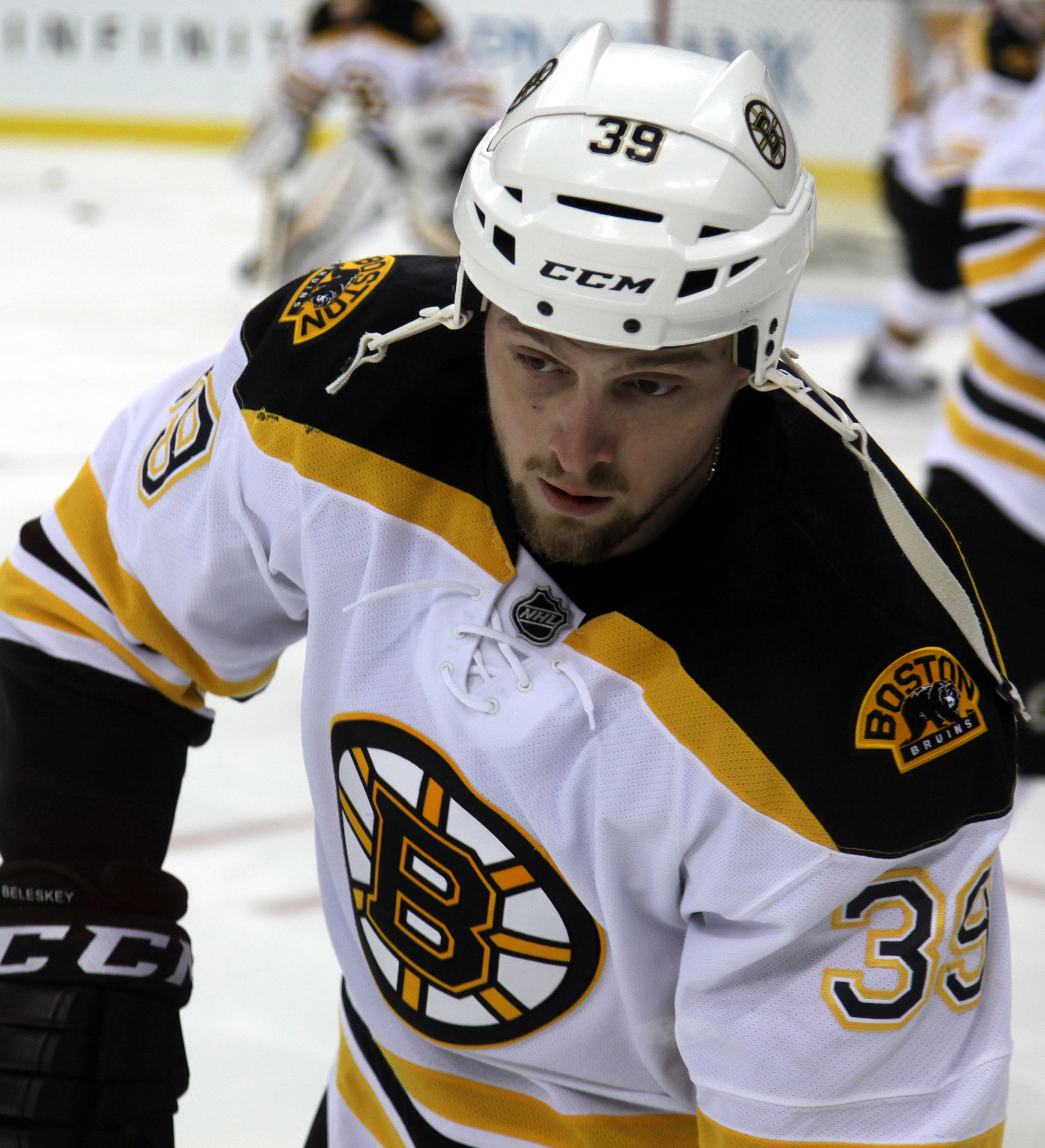 Beleskey in March 2016.